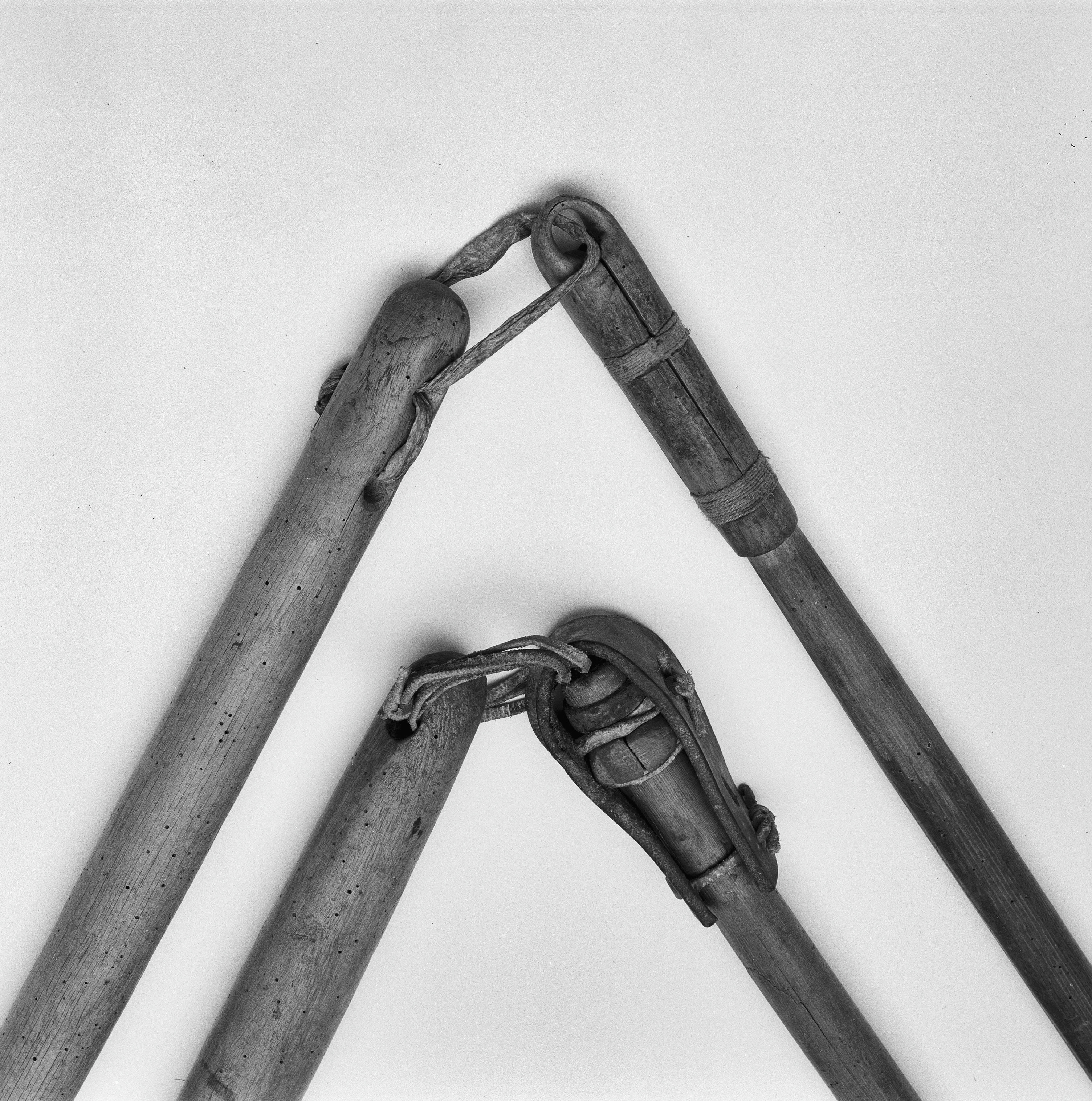 Dorsen/ Gereedschap: Dorsvlegels (opmerking: Gefotografeerd voor Het Weke Dak)